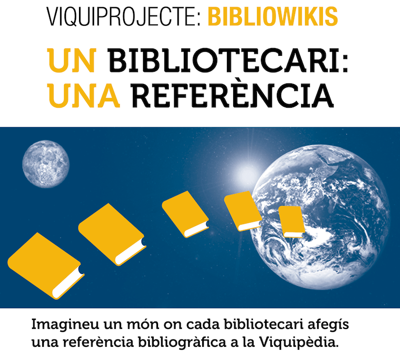 Campanya Bibliowikis 1lib1ref en català 2017.